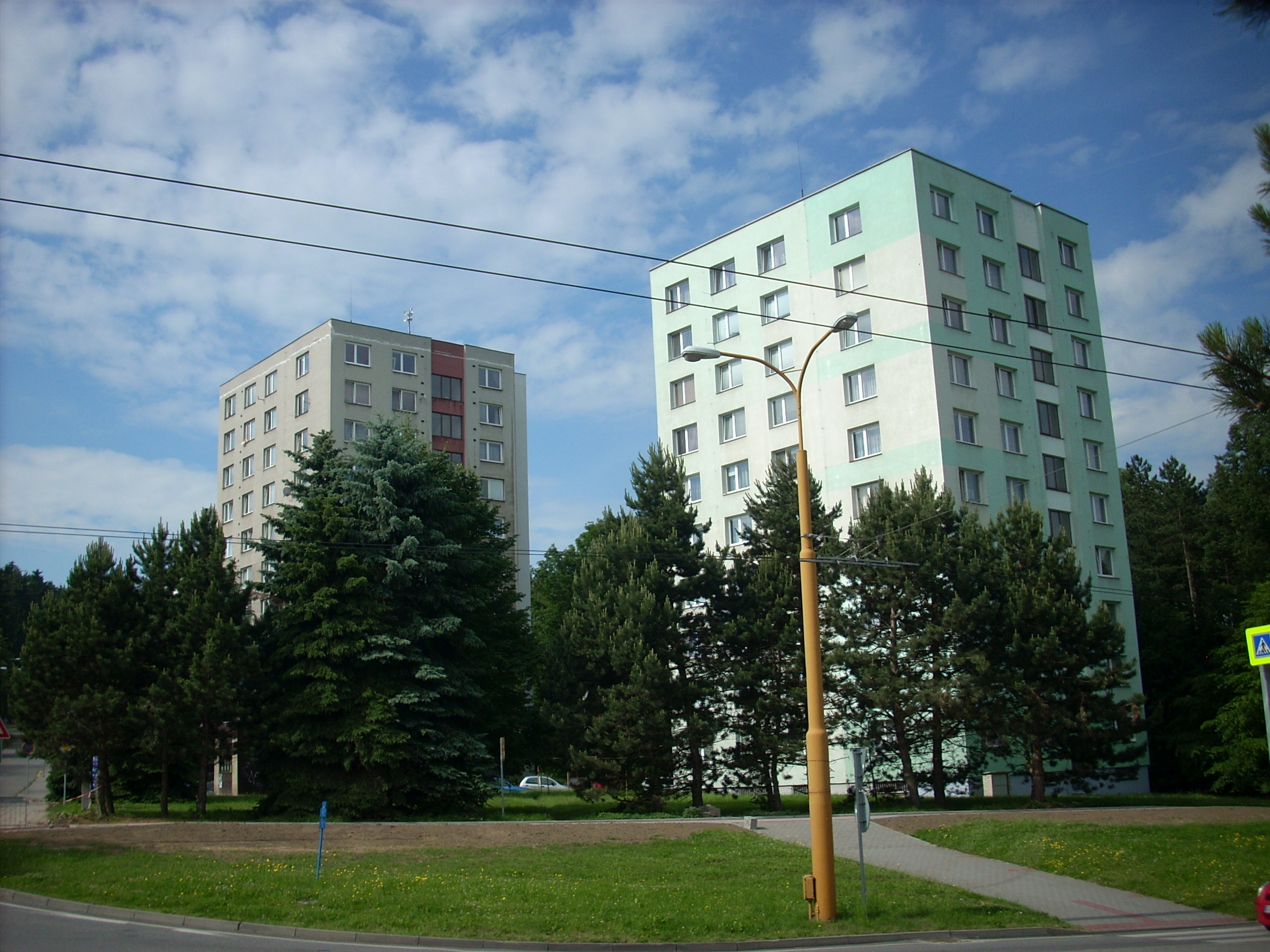 Okružní Jihlava paneláky